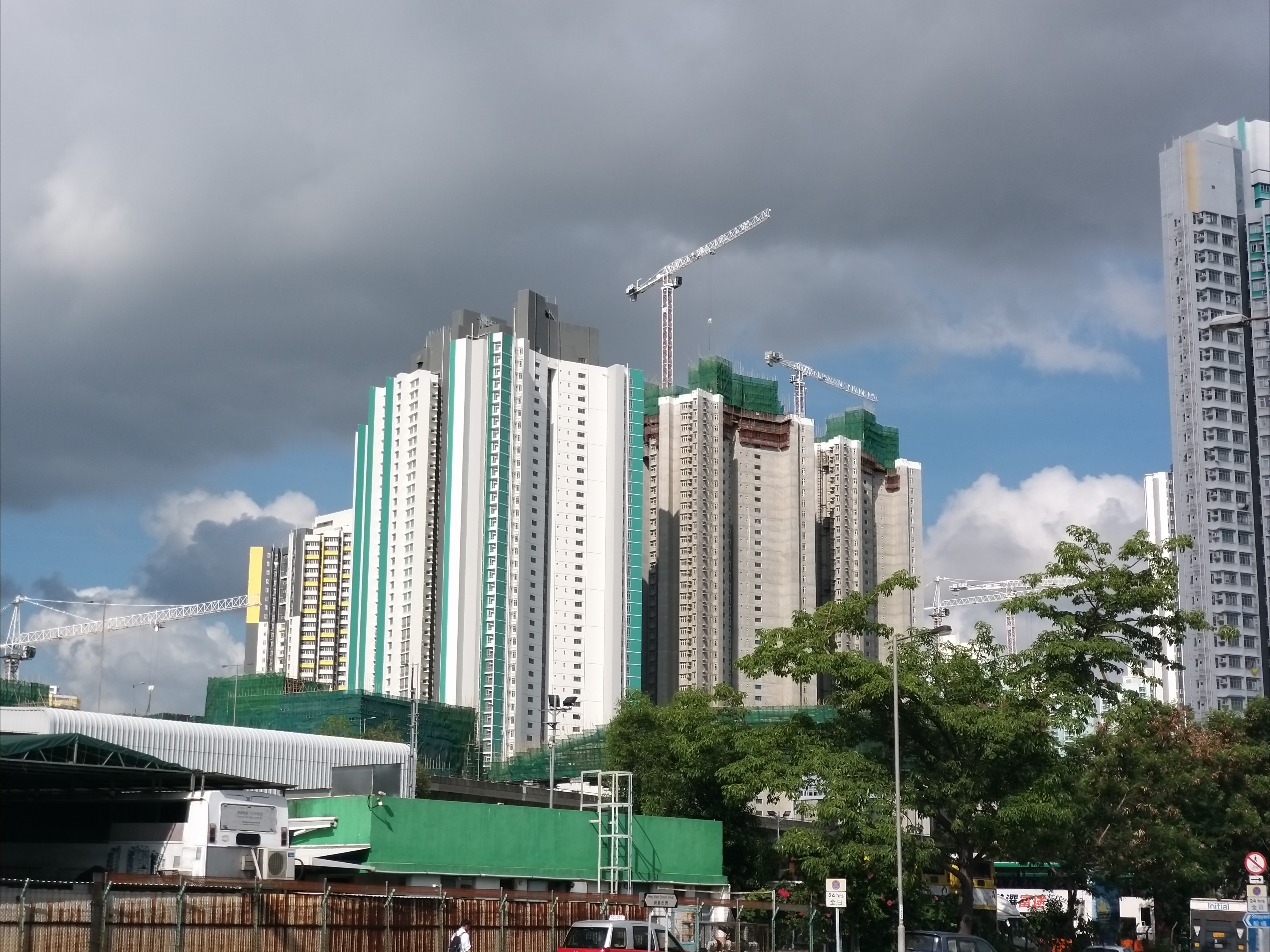 西九填海區上姍姍來遲的公屋建設